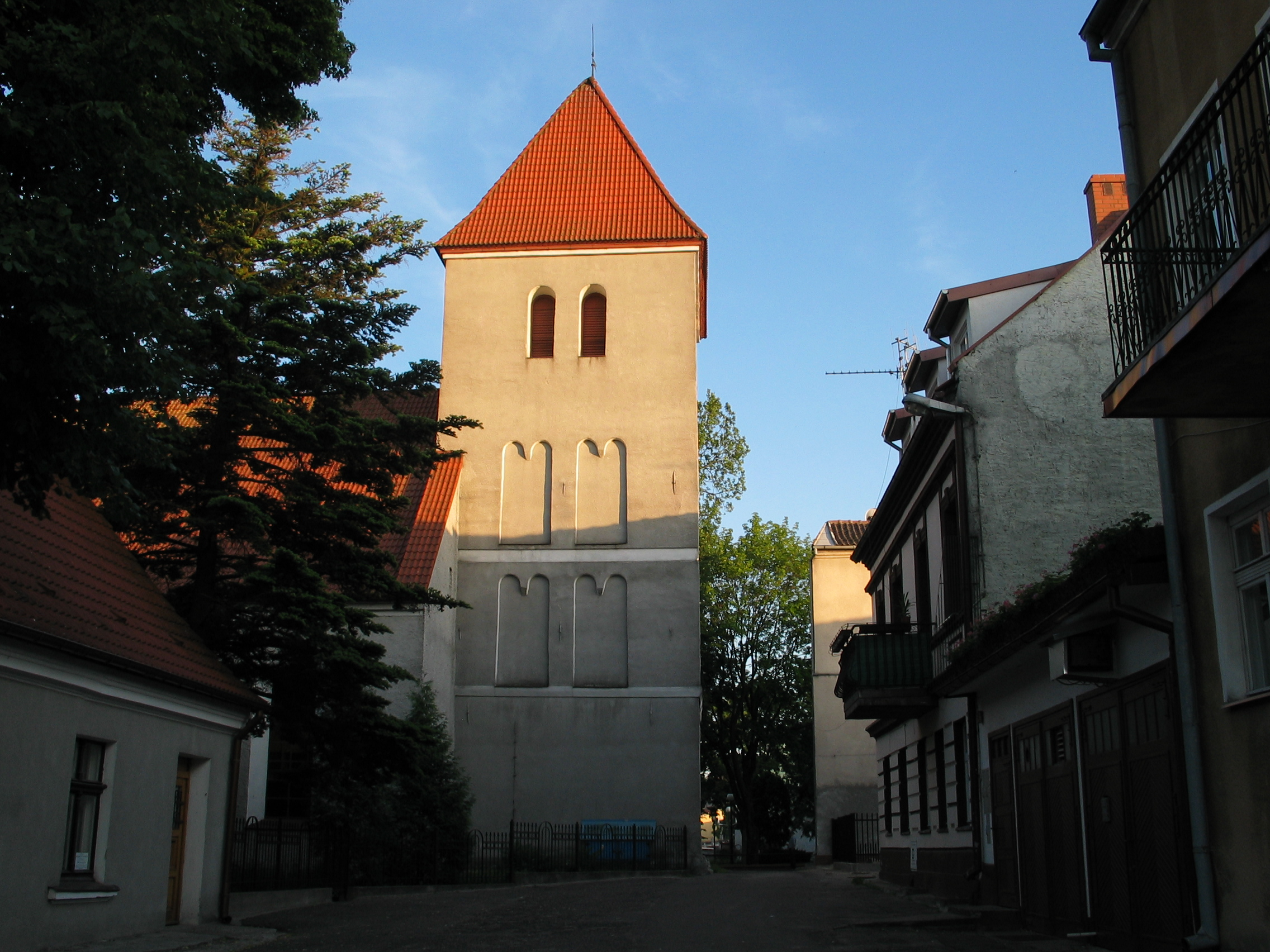 Mrągowo, ul. Kościelna 2 - kościół ewangelicko-augsburski (zabytek nr A-1085 z 6.08.1968)